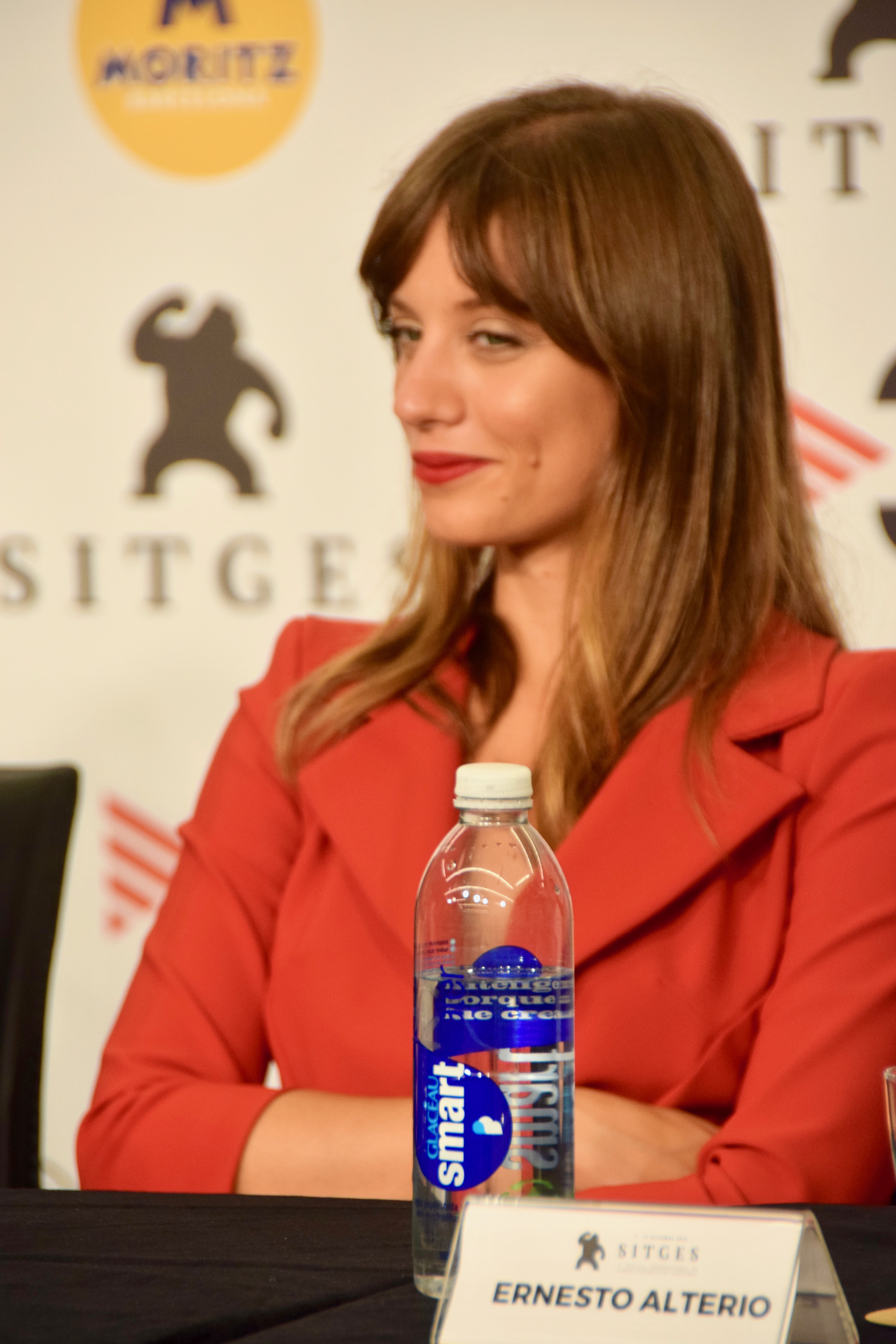 Festival de cinema de Sitges 2018